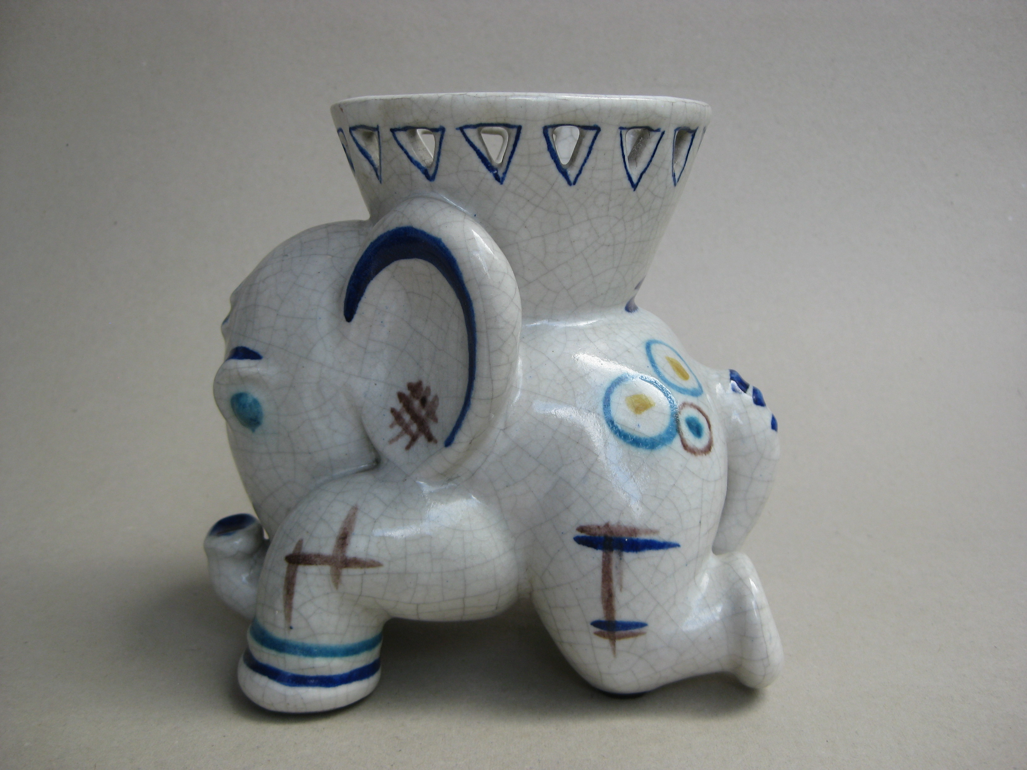 Ludwig König, Großherzogliche Majolika-Manufaktur Karlsruhe, Verdunster Elefantenform, Seriennummer 1647, 1922, Höhe: 20 cm. Auf der Unterseite neben der üblichen Kennzeichnung Pinselsignaturen LK (Ludwig König) und AK (Augusta Kaiser). Deckel fehlt. Norddeutsche Privatsammlung.